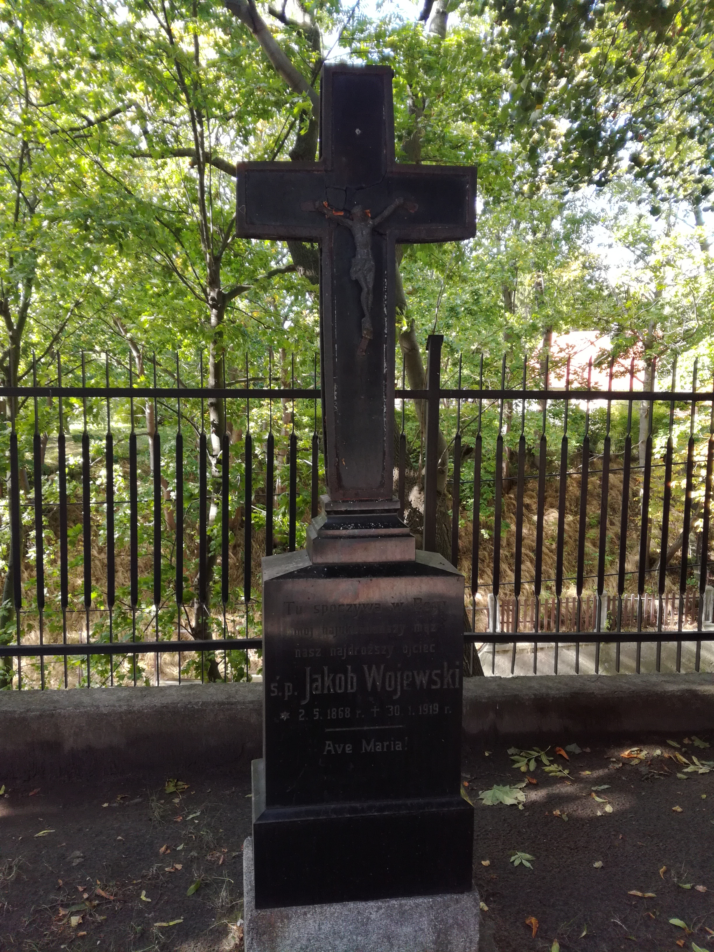 Grób Jakuba Wojewskiego na cmentarzu w Gdyni-Oksywiu